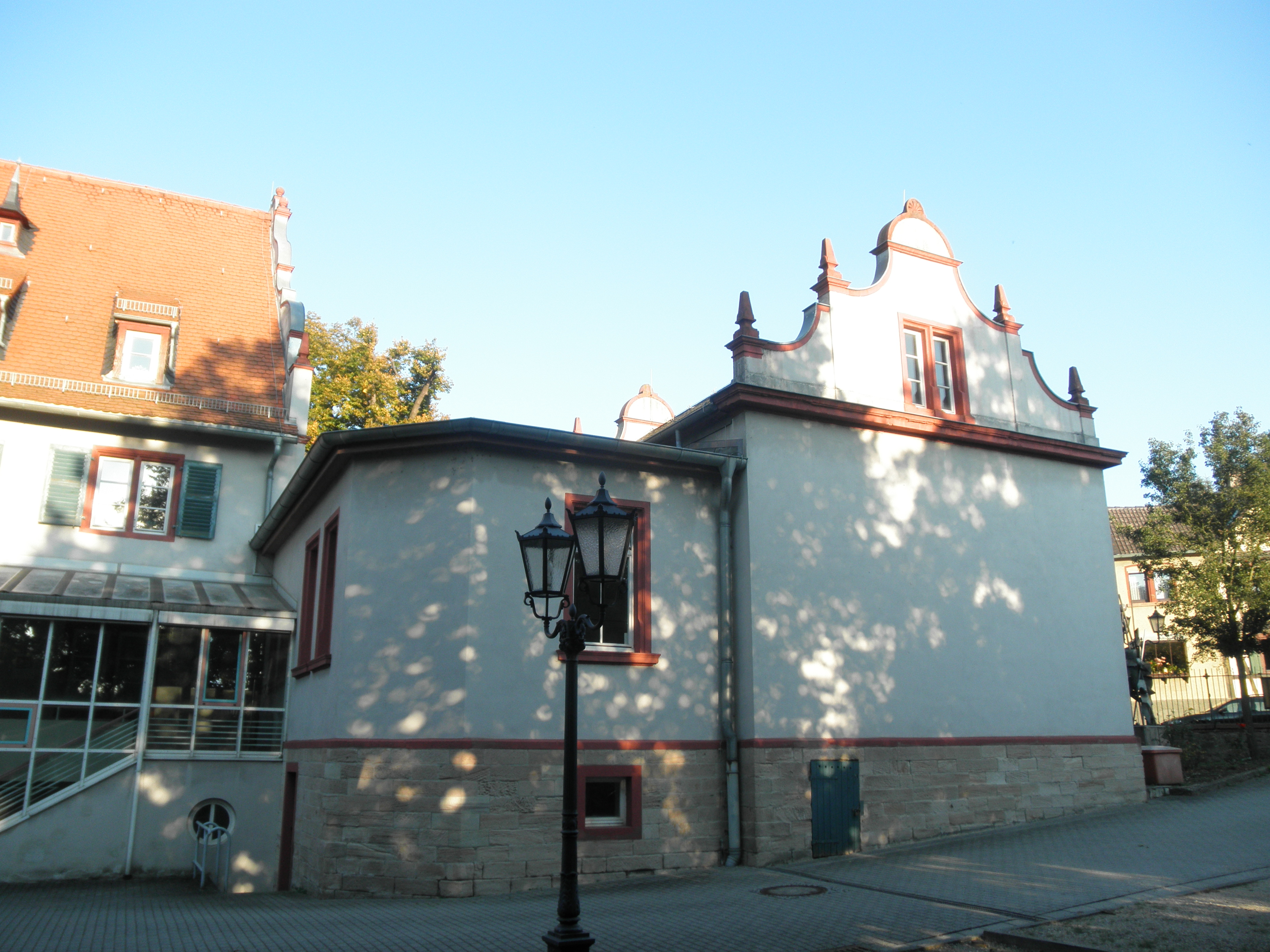 Zwingenberg: historia juĝejo Obertor 1 (monumenta n-ro Zwingenberg 57)